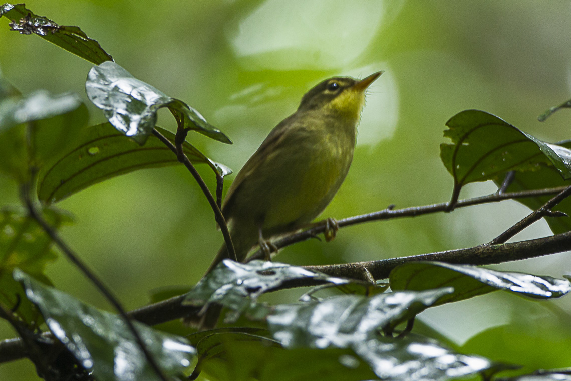 Spectacled Greenbul - Madagascar_S4E7249